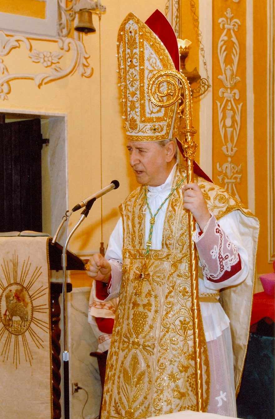 Monsignor Mario Oliveri, vescovo d Albenga-Imperia.